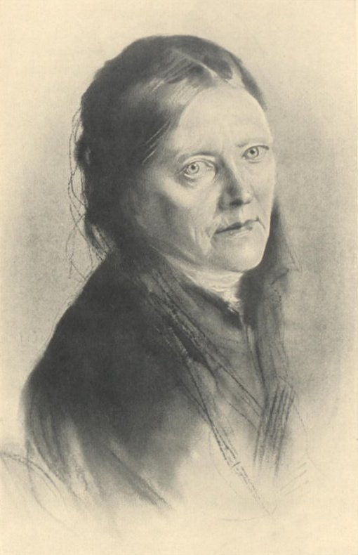 Portrait de Malwida von Meysenbug par Franz von Lenbach.